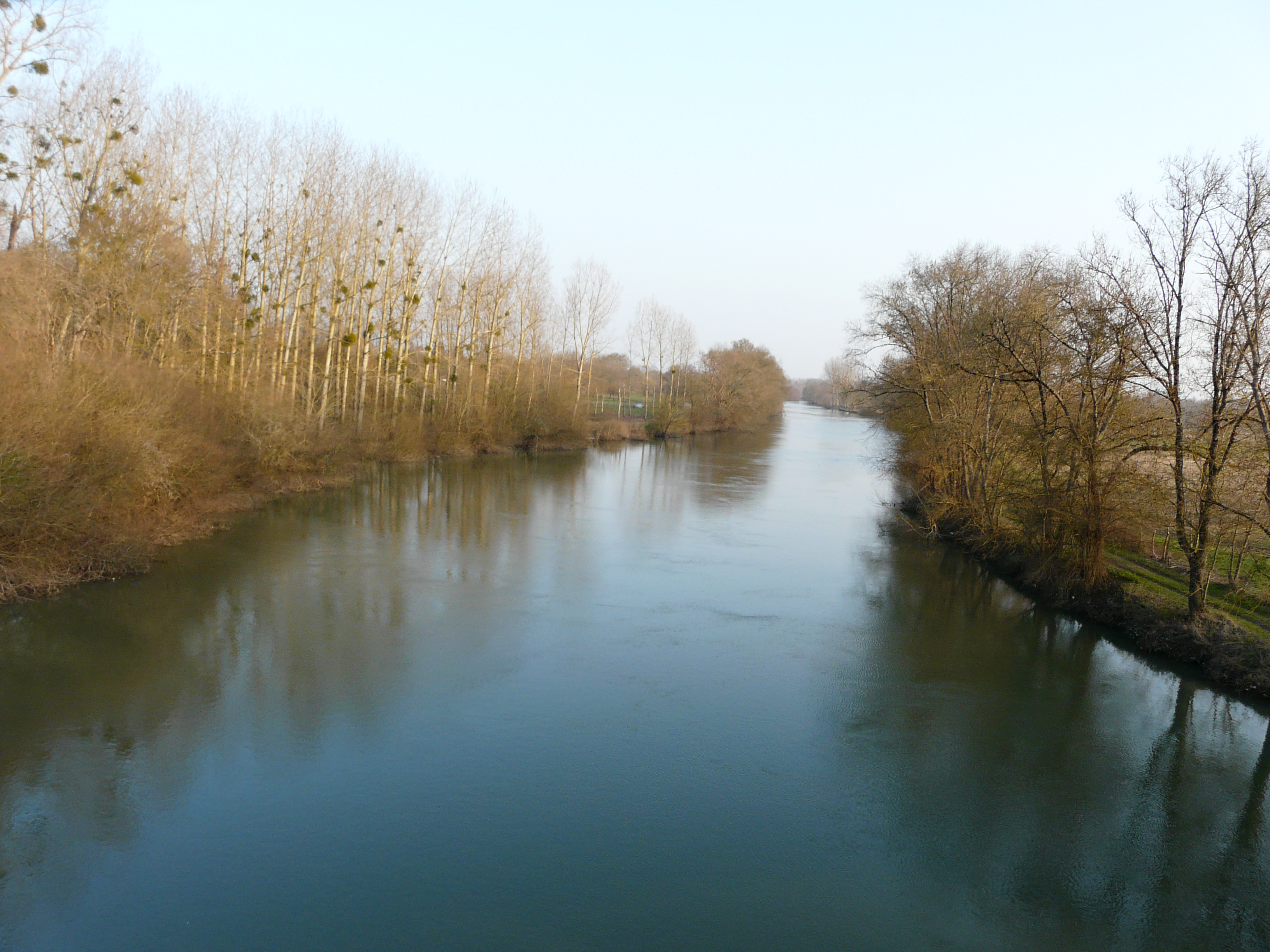 La Charente, en amont du pont de la route départementale 144, entre Saint-Laurent-de-Cognac (à gauche) et Merpins (à droite) ; Charente, France.